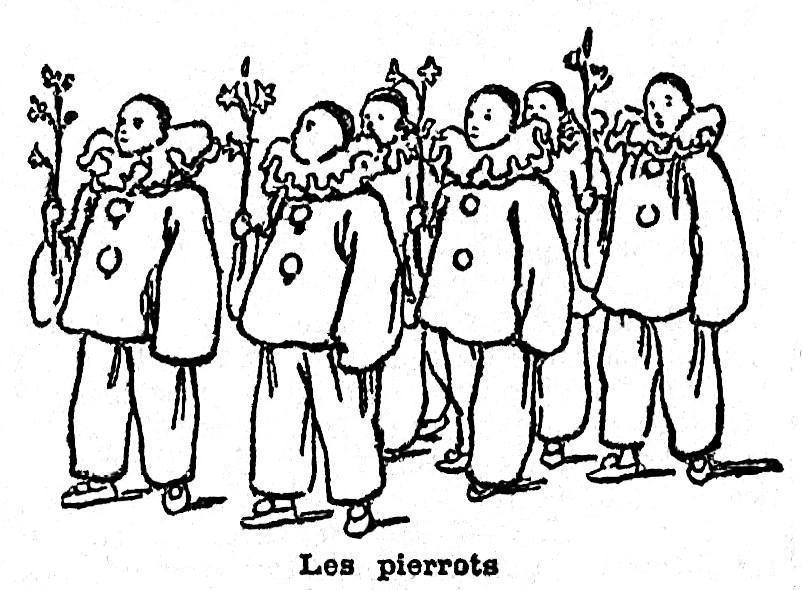 Une partie de la troupe des Pierrots et Colombines de Willette à la Promenade de la Vache enragée 1896. Elle était placée sous la direction de Willette costumé en Pierrot noir. Il a défilé le jeudi de la Mi-Carême 12 mars 1896.